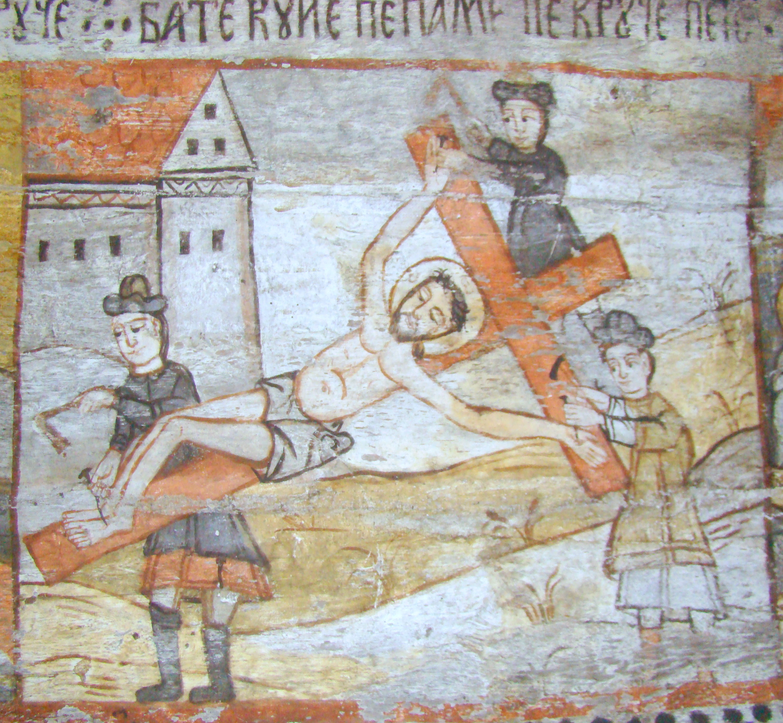 Biserica de lemn „Nașterea Maicii Domnului” din Călinești-Căeni, județul Maramureș